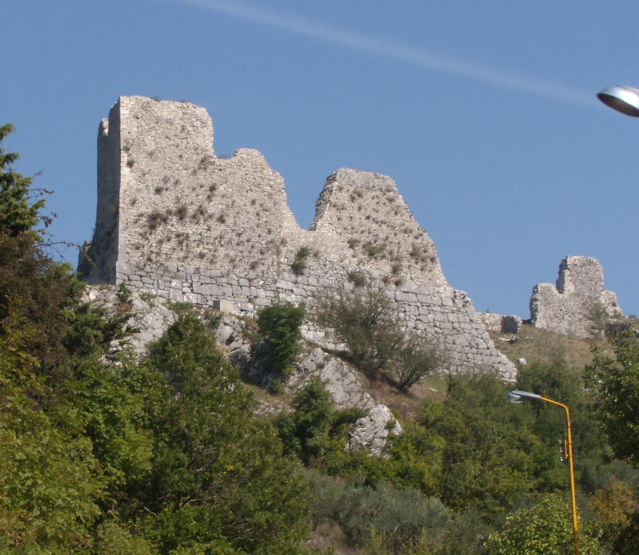 Il Castello di Morcone (Italia).